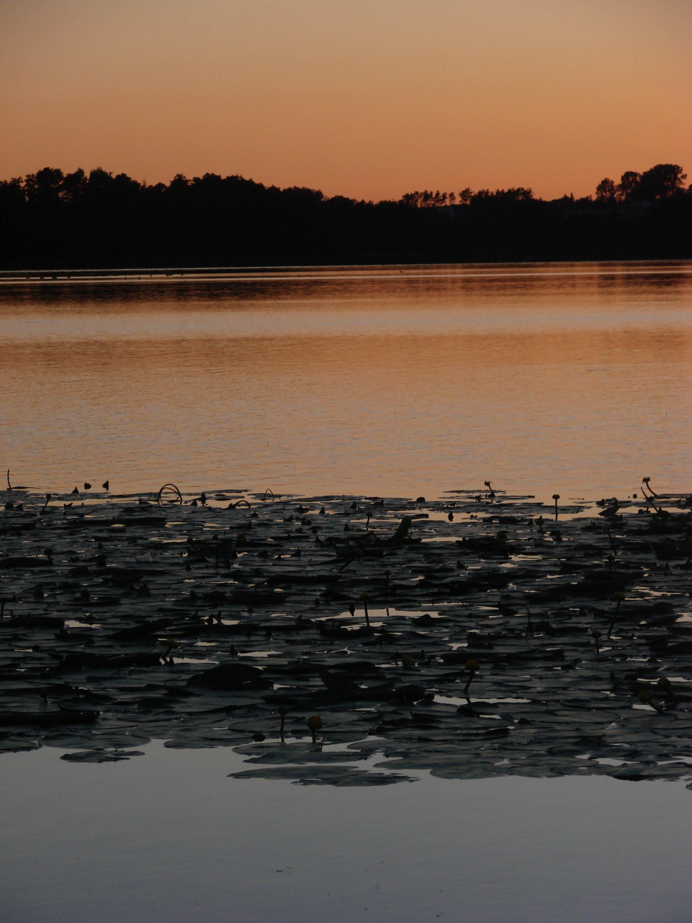 Jezioro Sępoleńskie o zachodzie słońca, od strony Sępólna Krajeńskiego. Sępoleńskie Lake, Place in Sępólno Krajeńskie, Poland.